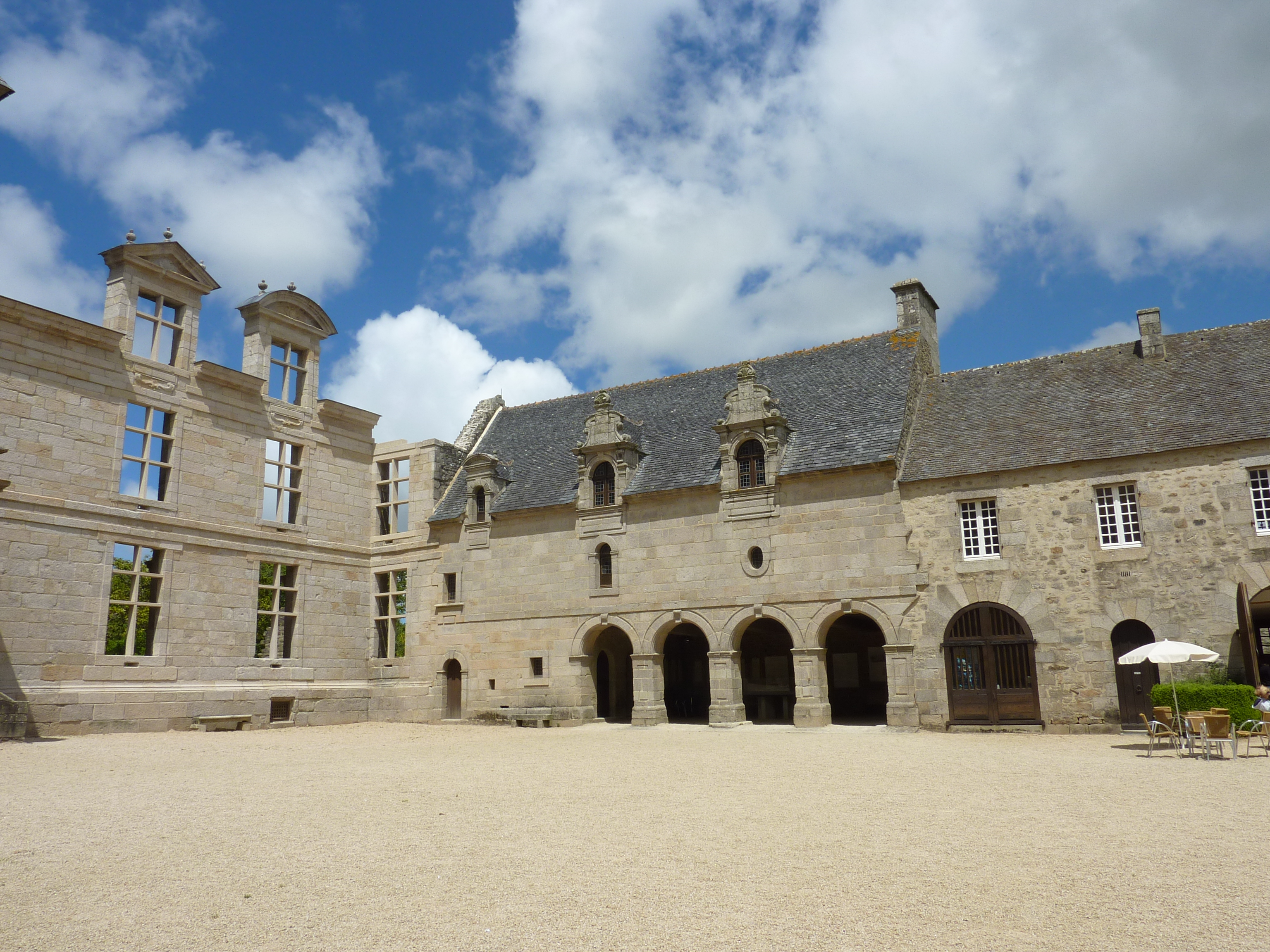 Château de Kerjean Cour intérieure Façades de l'angle nord-est